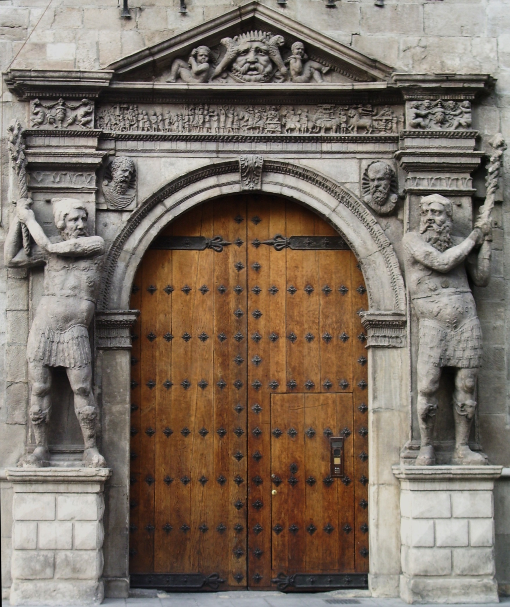 Portada_Palacio_de_los_Luna. Según interpretación de Carmen Gómez Urdáñez, Heracles a la derecha y Gerión a la izquierda; otras fuentes identifican la figura de la izquierda con Teseo.